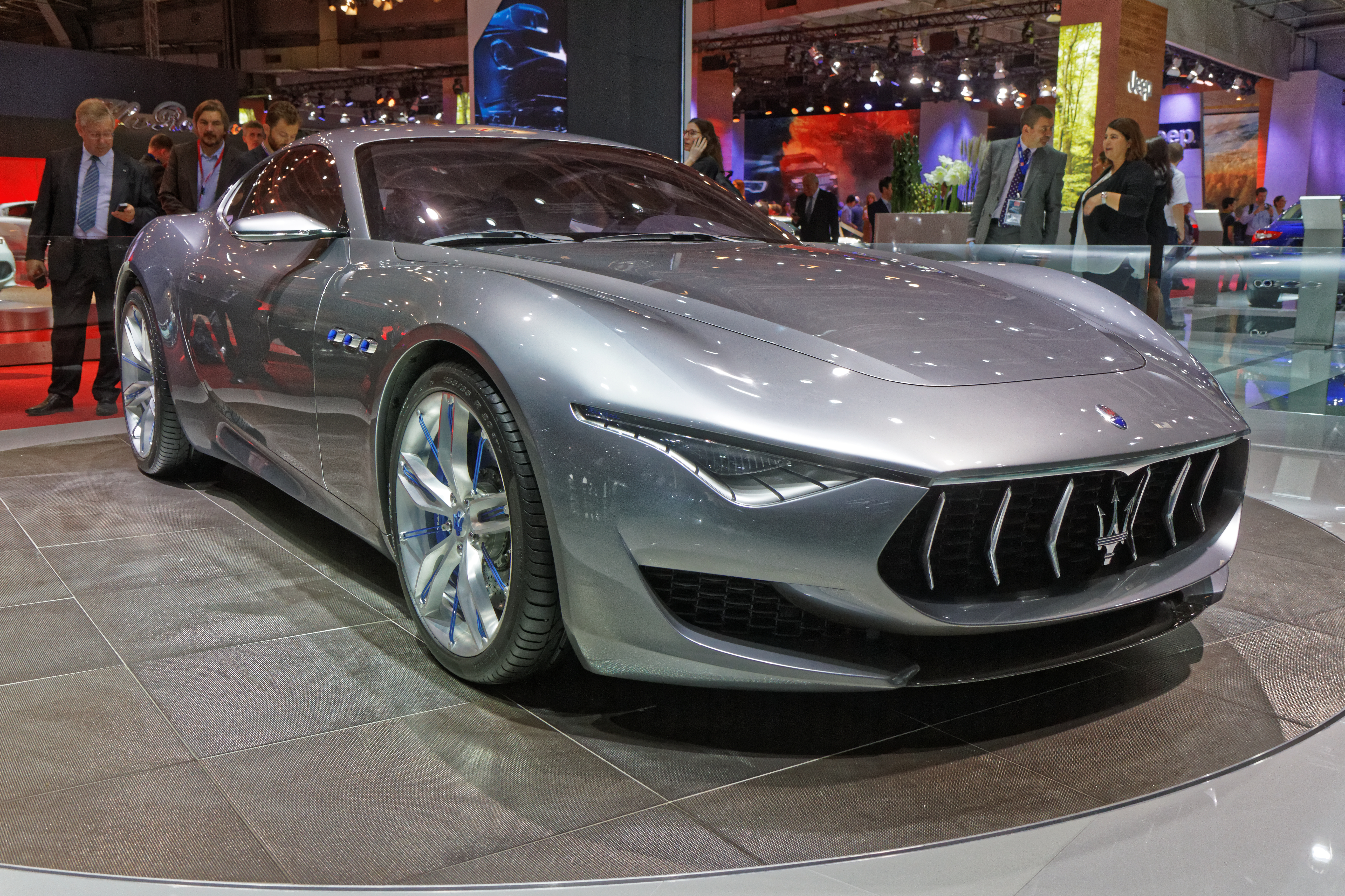 Une Maserati Alfieri concept présentée lors du mondial de l'automobile de Paris 2014.